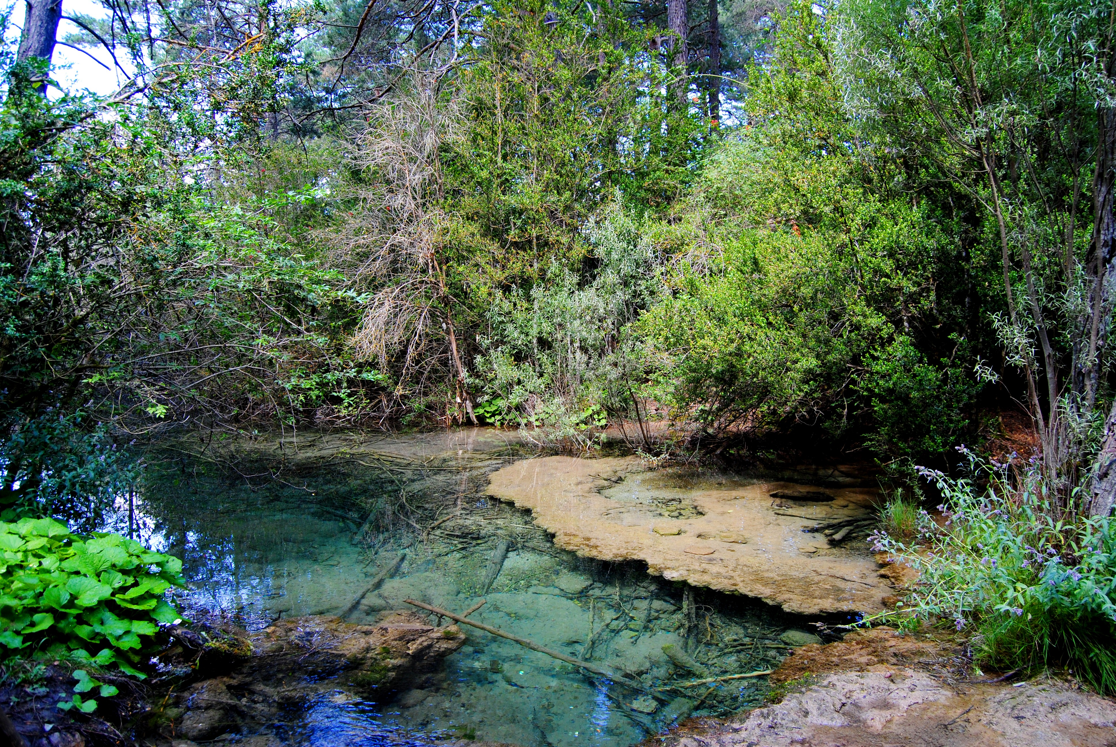 Transparent River Cuervo - Nacimiento del río cuervo (source of the Cuervo River), Cuenca Province, Spain